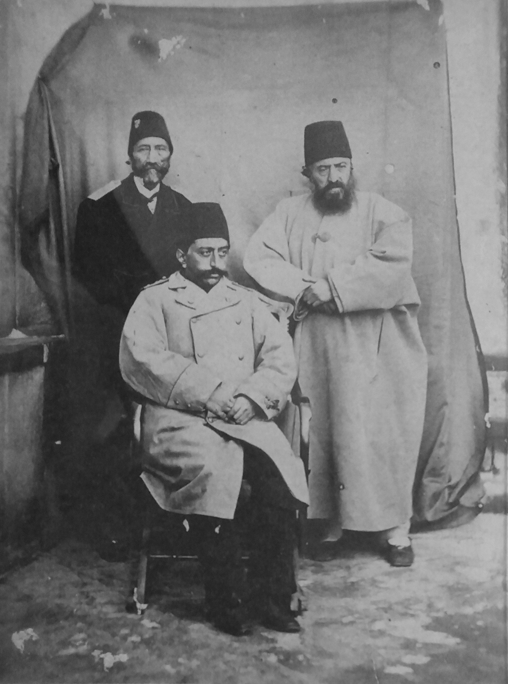 نشسته: مظفرالدین‌شاه قاجار در دوران ولیعهدی، ایستاده: راست محمدرضا خان صدیق‌الدوله، چپ امیرنظام گروسی